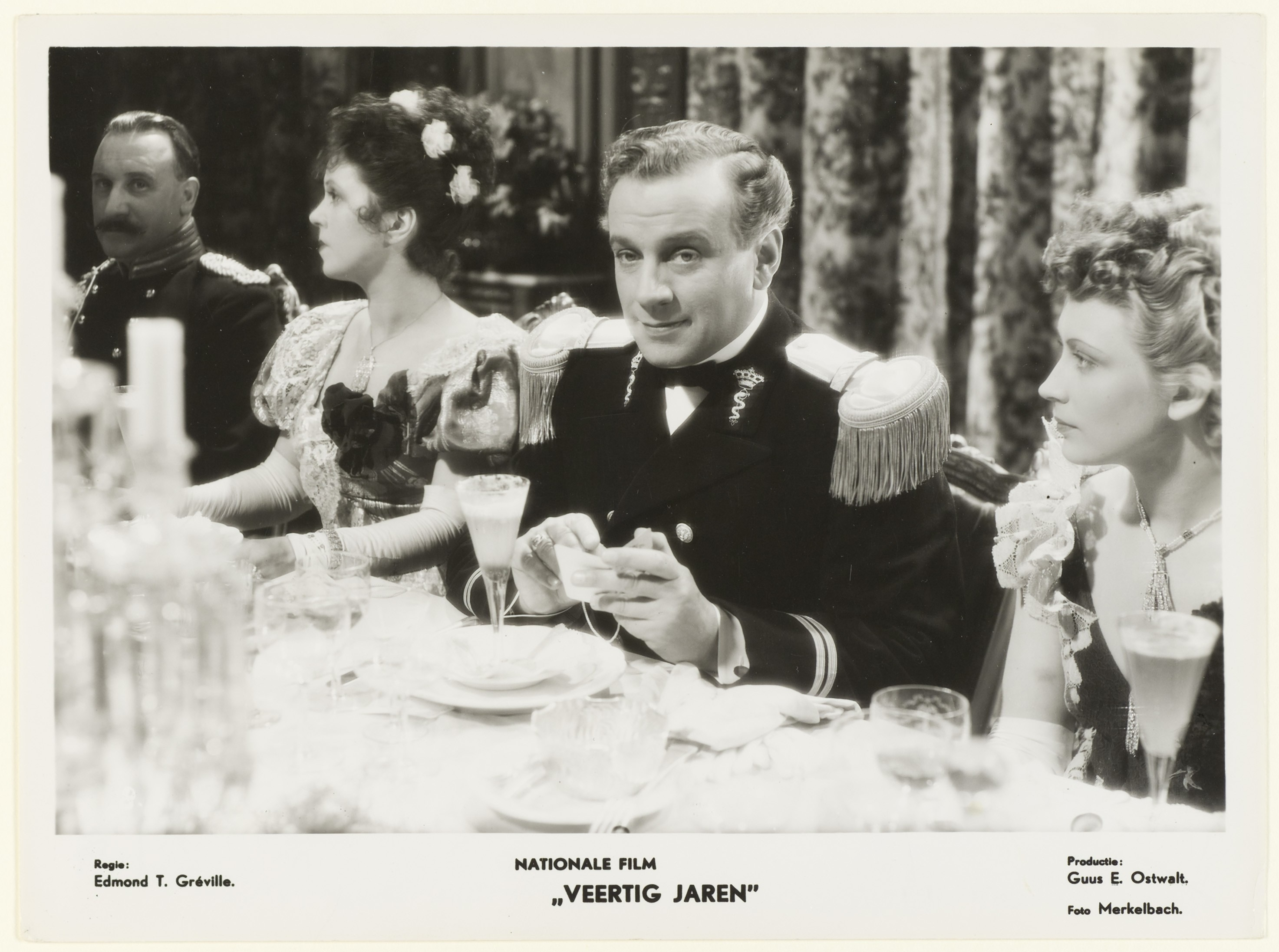 Cees Laseur (1899-1960) en Lily Bouwmeester (1901-1993) op de poster van de vooroorlogse film Veertig jaren (1938).